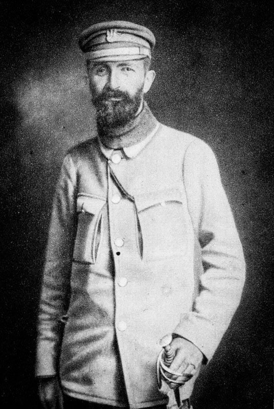 Young Walery Sławek (1879-1939)